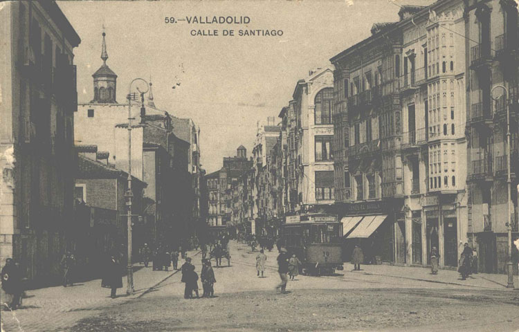 Calle de Santiago - Valladolid - L. J. Valladolid - Valladolid. 52 - Calle de Santiago. - Tarjeta postal. Papel 138 x 90 mm B/N